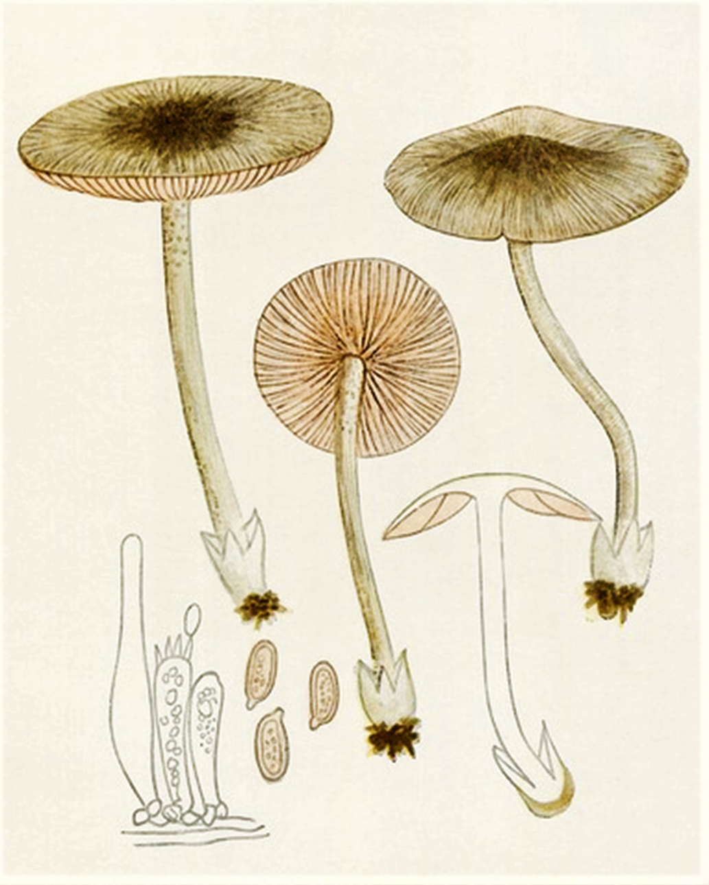 Giacomo Bresadola: Volvaria fuscidula (Schaeff., 1929), heute: Volvariella fuscidula (Bres..) M.M.Moser (1953)